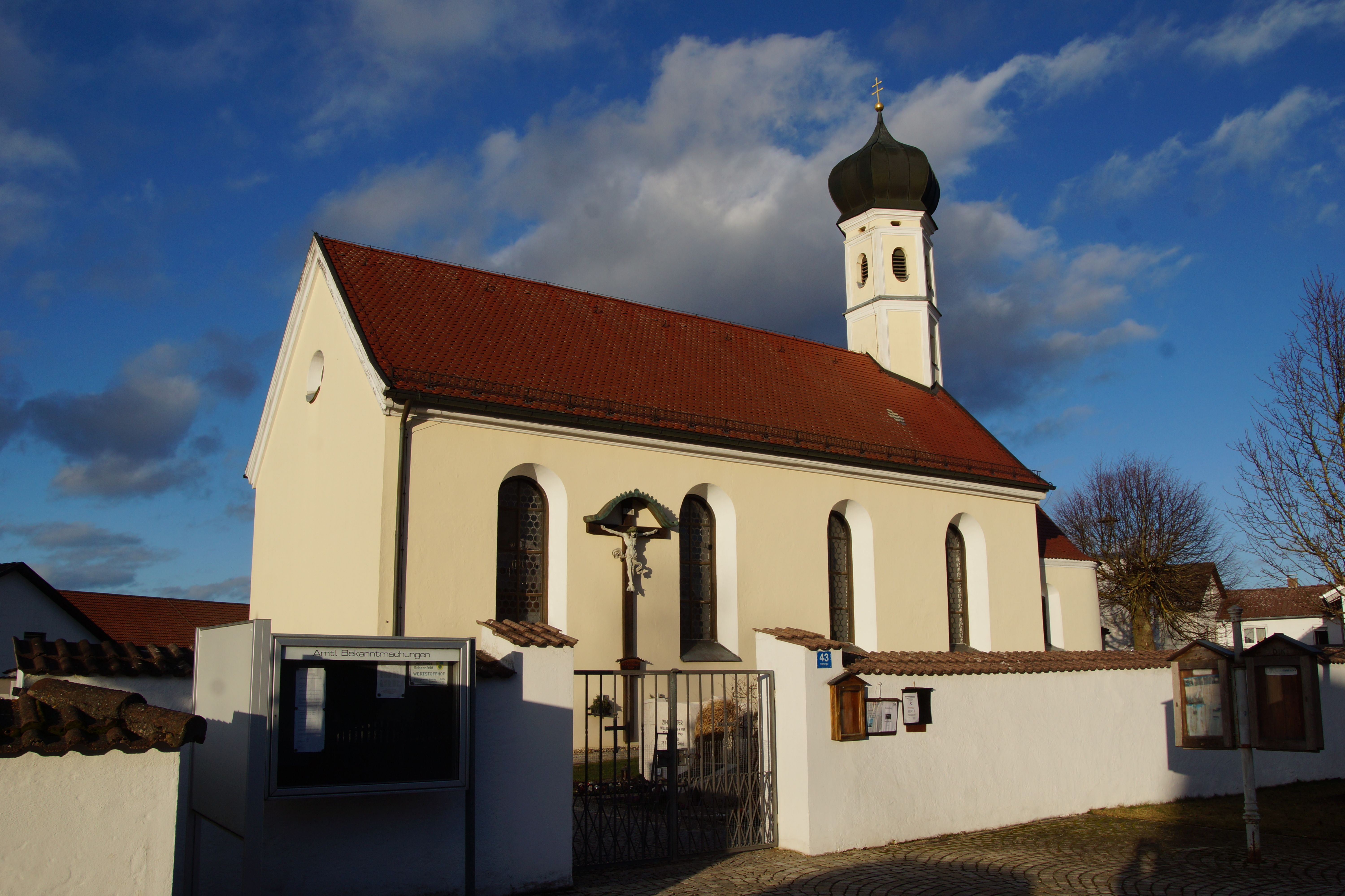 Die Pfarrkirche St. Ägidius in Schönfeld, Kreis Eichstätt